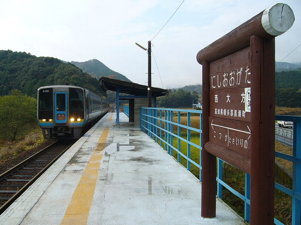 西大方駅を通過する「南風16号」